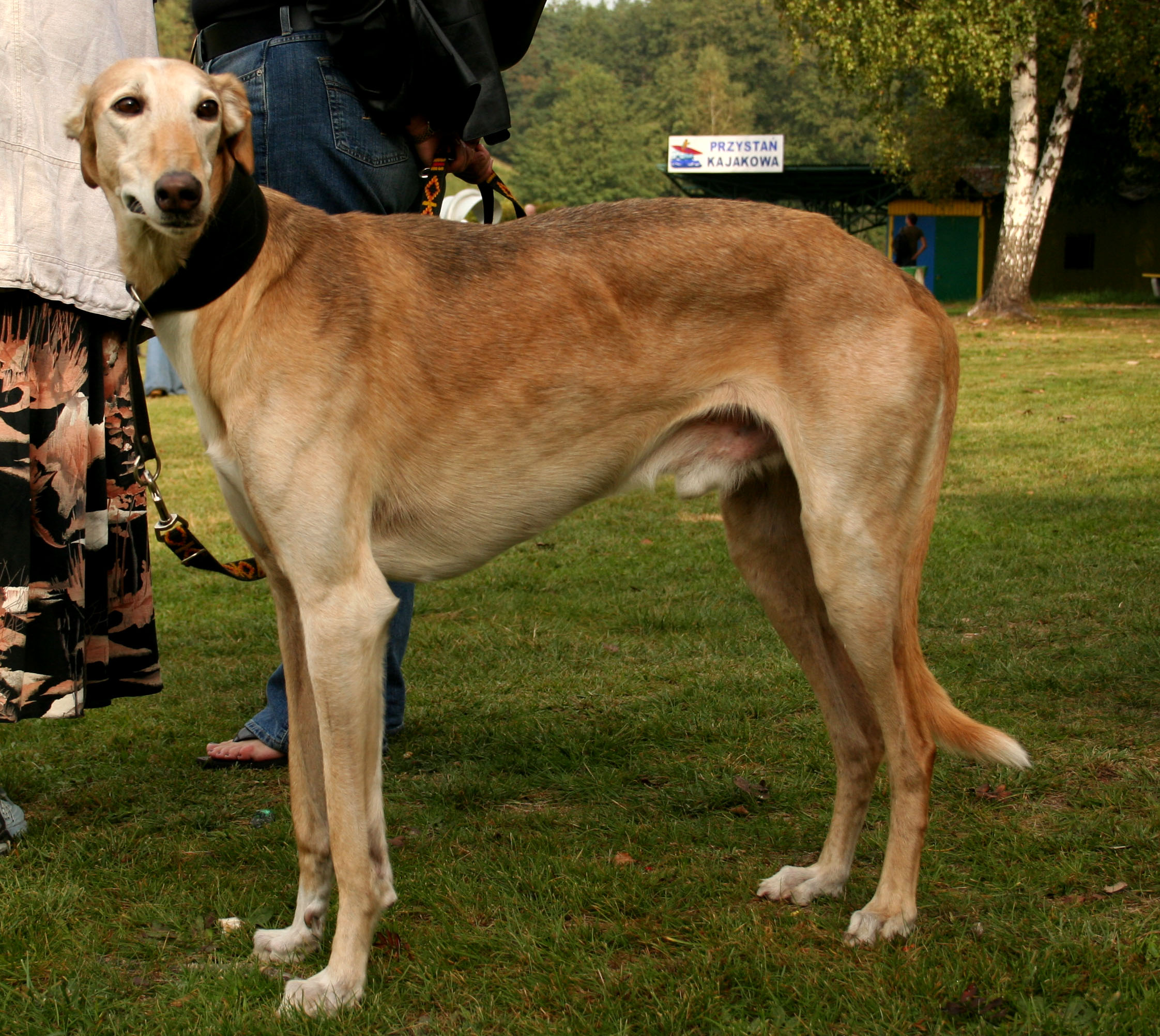 chart polski na krajowej wystawie w Rybniku - Kamieniu